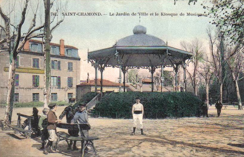 Saint-Chamond, jardin public, kiosque, école pratique, carte postale colorisée, vers 1905.